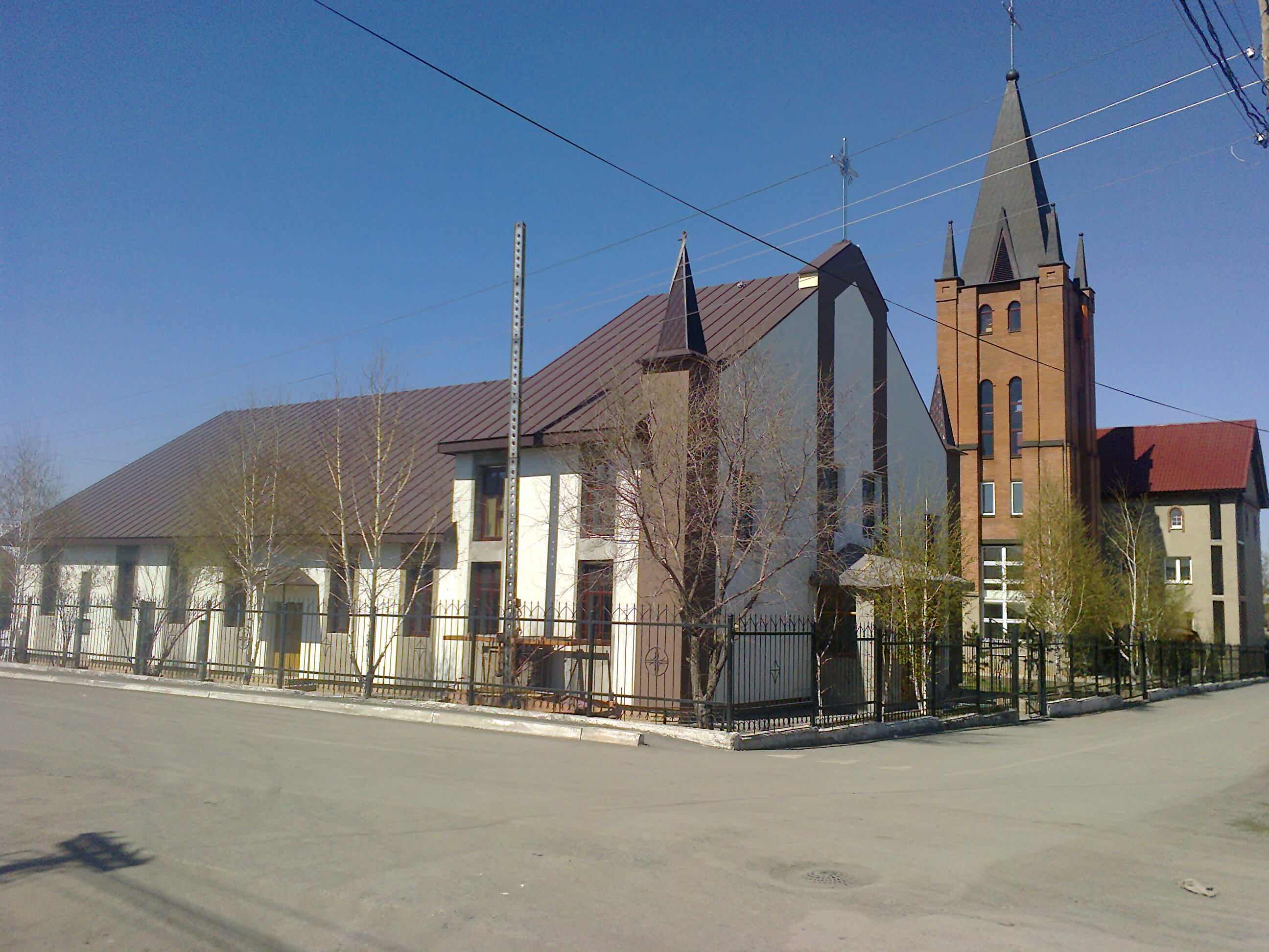 Собор Святого Иосифа (Караганда) с делека